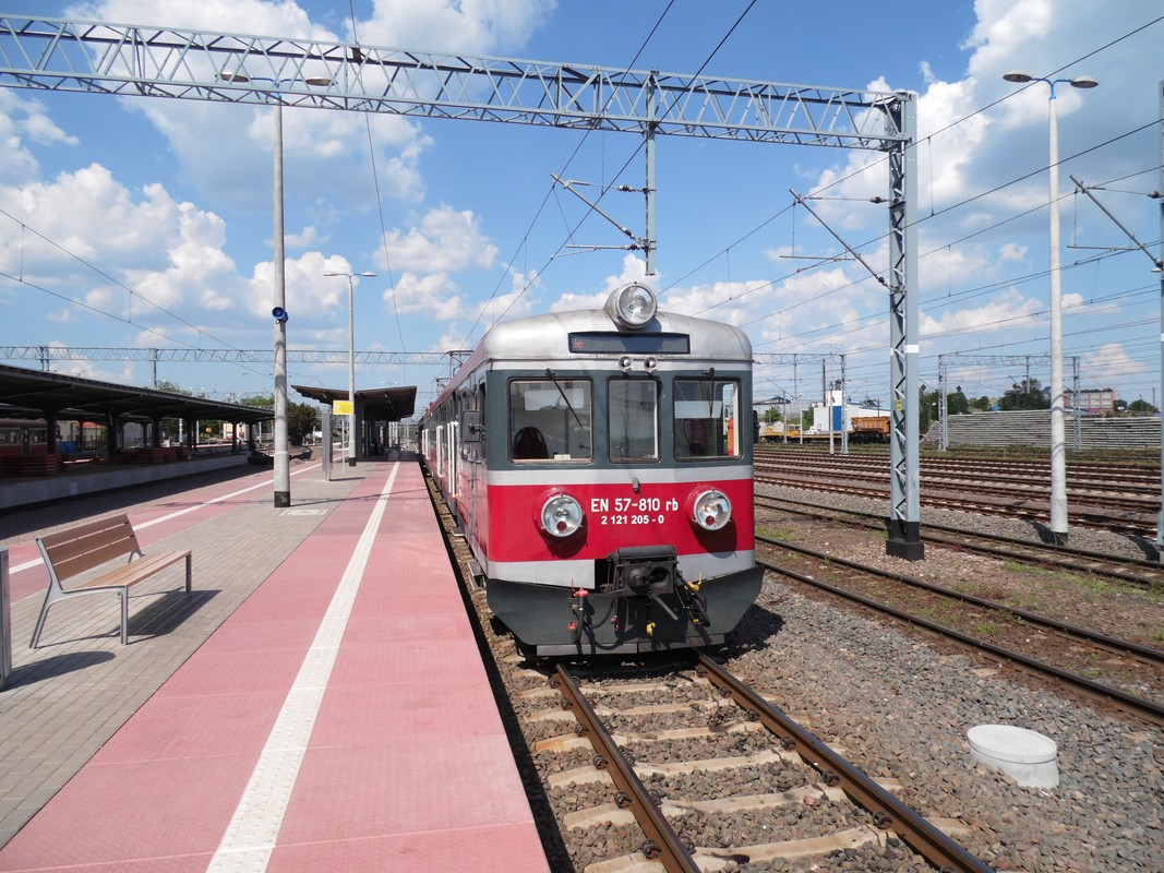 PKP. IŁAWA GŁÓWNA. PRACE TOROWE NA STACJI.